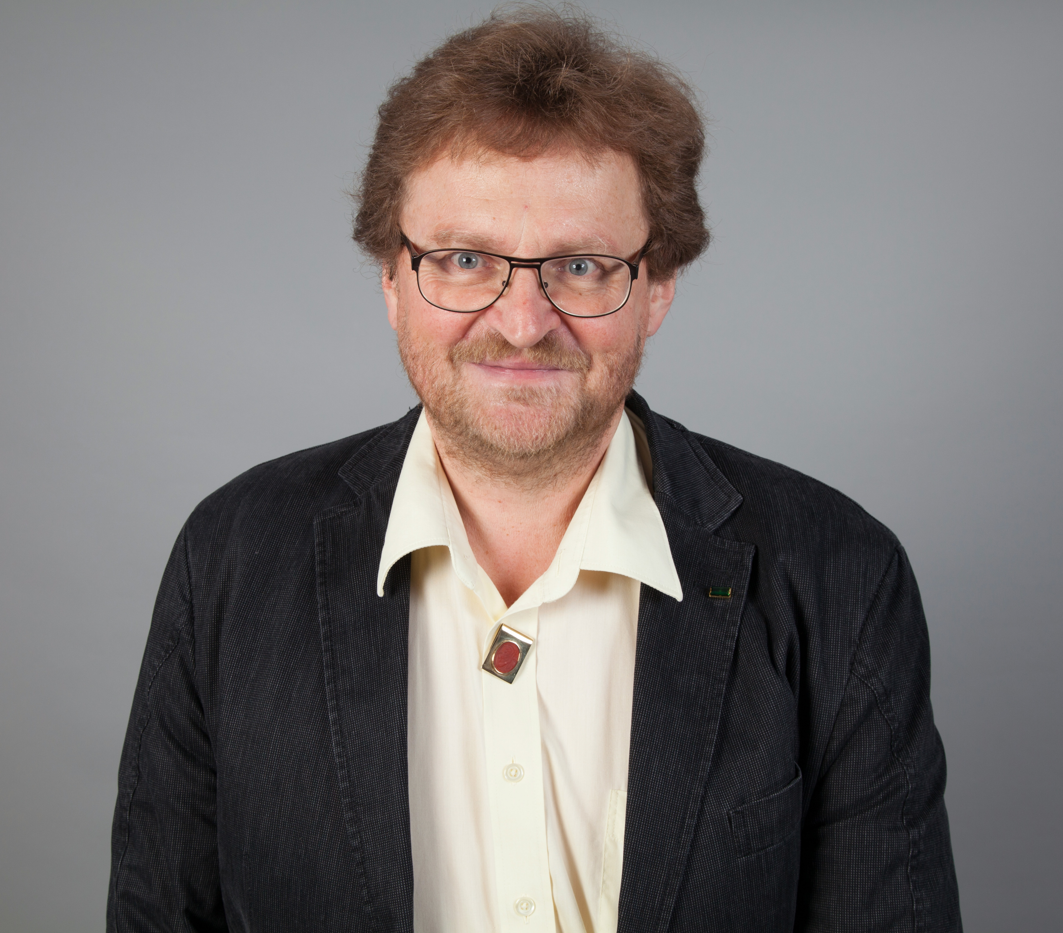 Ulf Eversberg, Abgeordneter der Bremischen Bürgerschaft